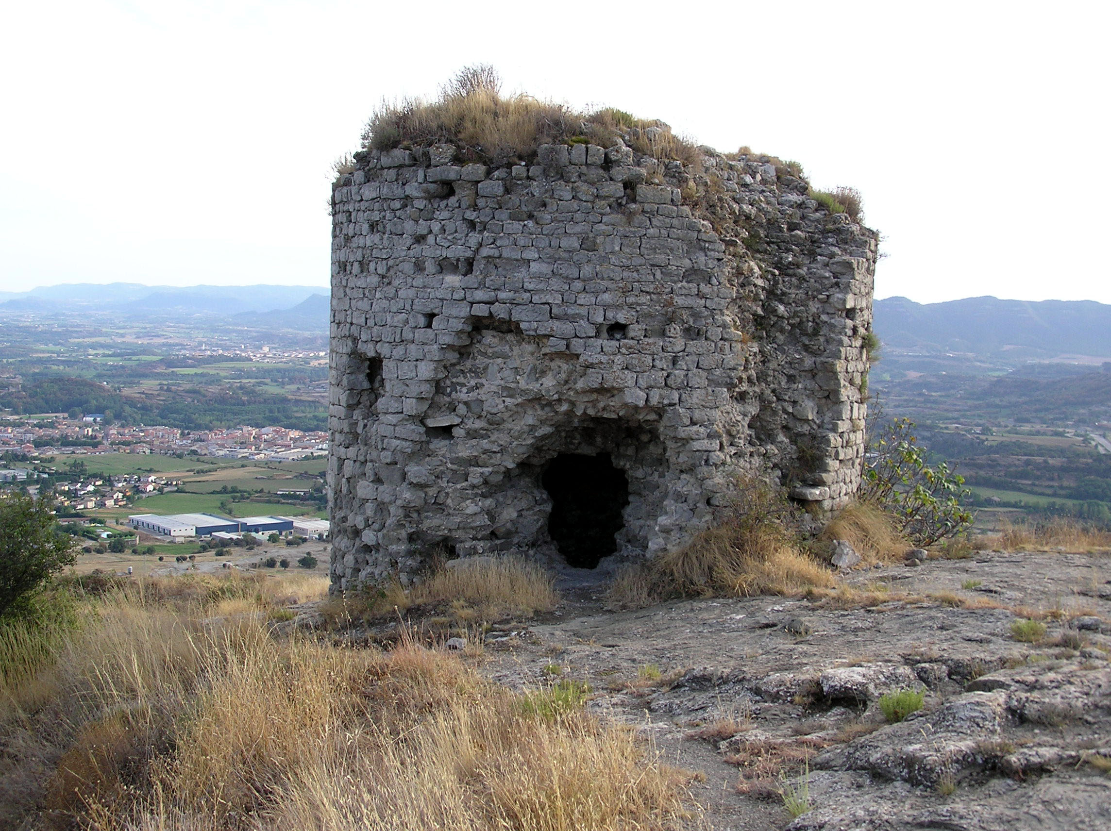 foto tomada por el autor del castillo de Torello